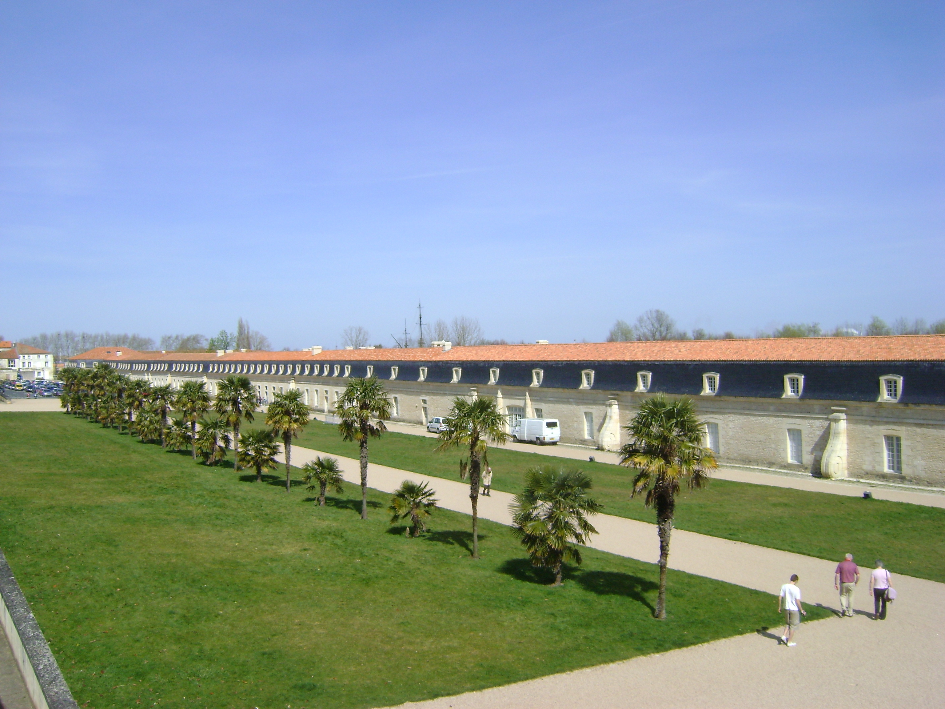 La Corderie Royale de Rochefort, Charente-Maritime. La façade ouest vers le nord. .